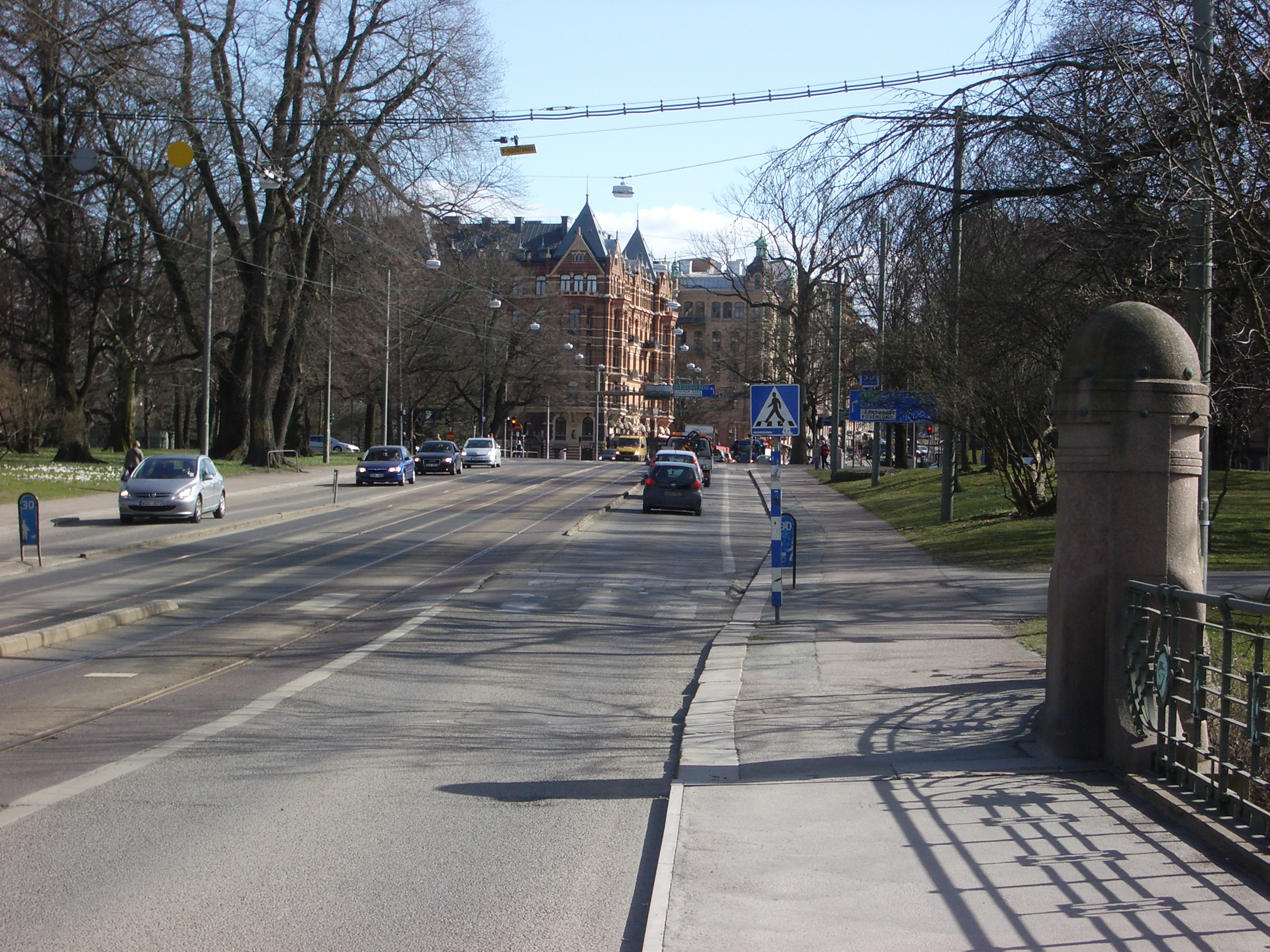 Raoul Wallenbergs gata i Vasastaden, Göteborg